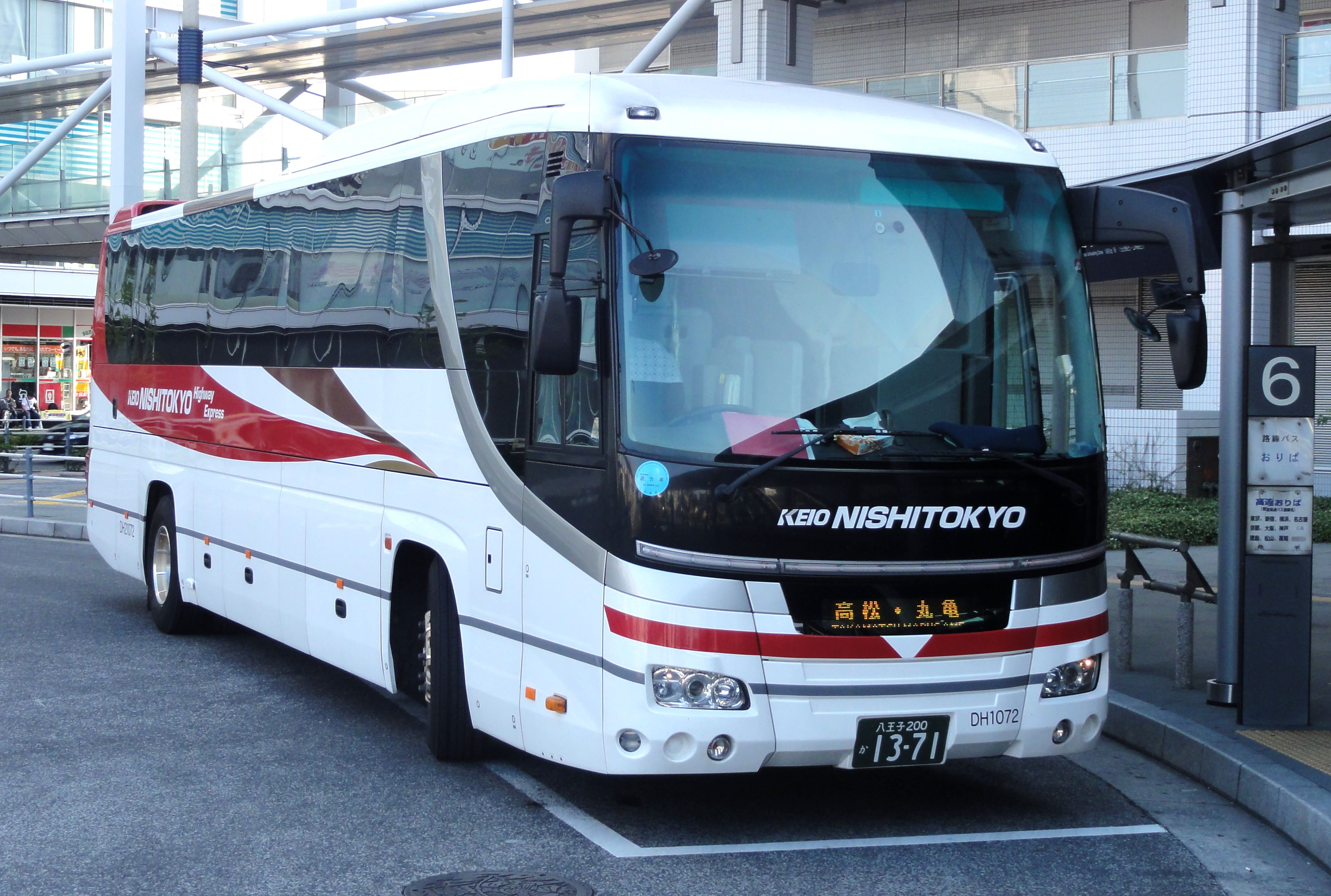 西東京バス・ハローブリッジ号、高松駅バス停にて